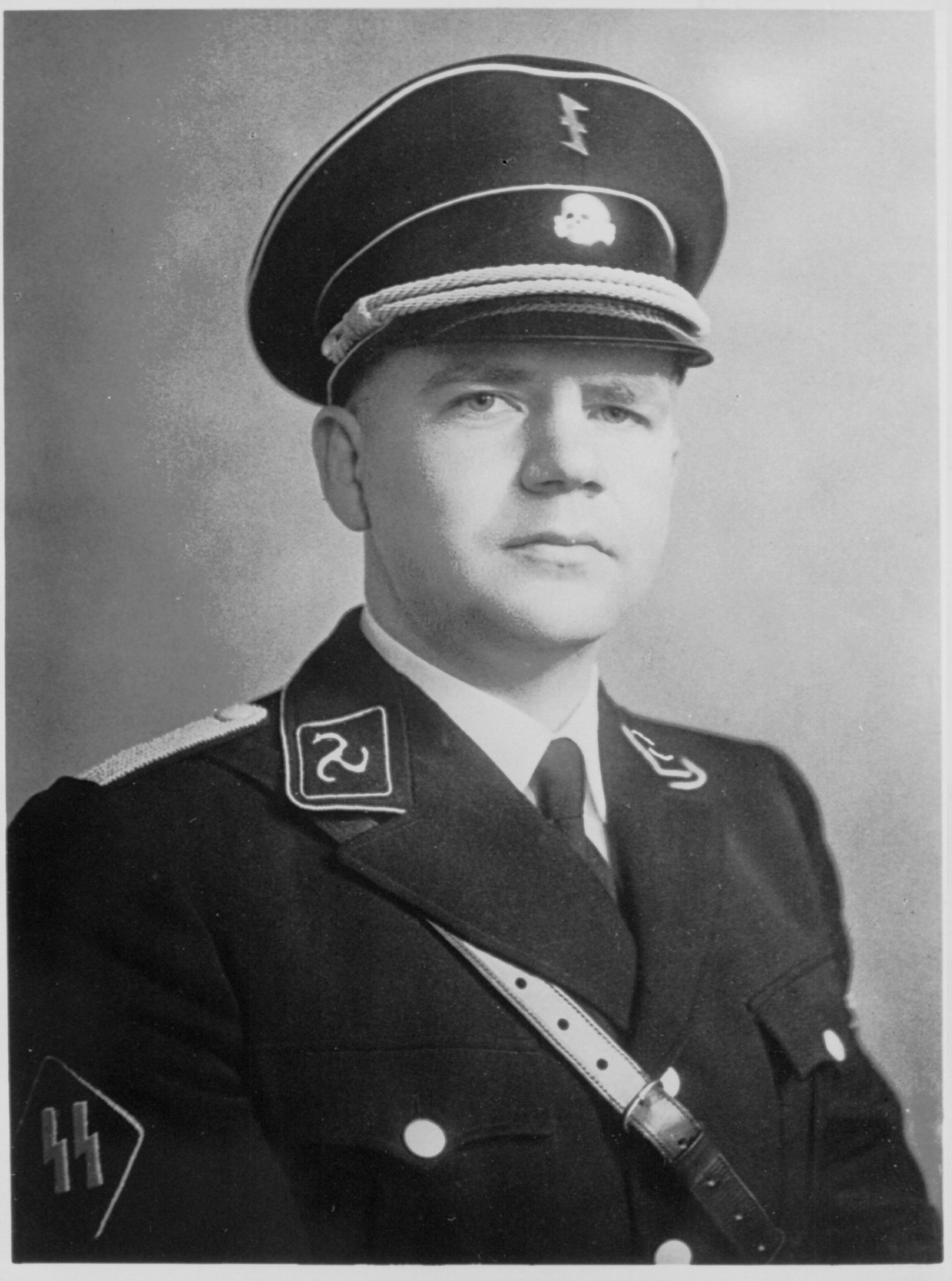 Portret van Johannes Hendrik Feldmeijer. Deze foto is afkomstig uit het archief van de Fotodienst der NSB.